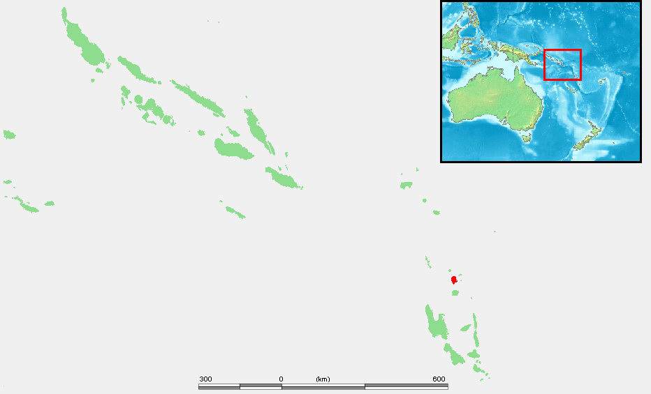 Island of Vanuatu - Vanua Lava.PNG